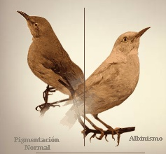 Aqui se aprecia la diferencia entre un ave albina y una normal.